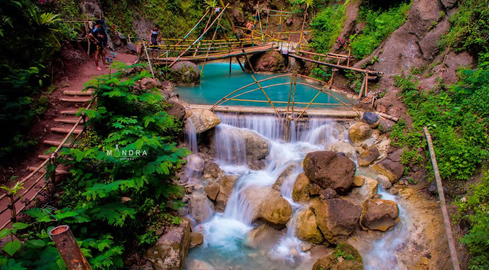 Kedung Pedut